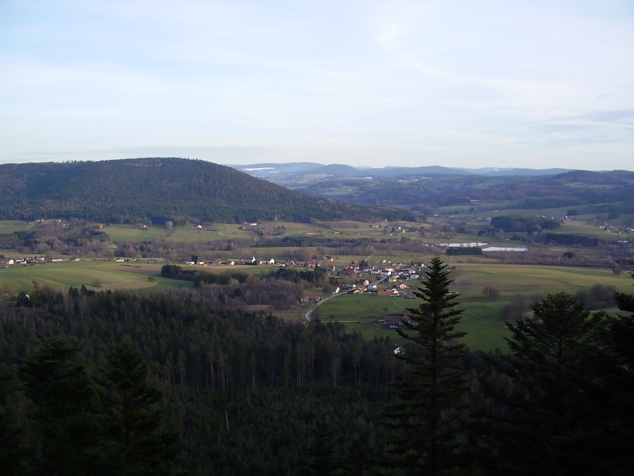 Vue du village Les Poulières depuis la Roche de la Clochette, en bordure de la Route forestière des plateaux.